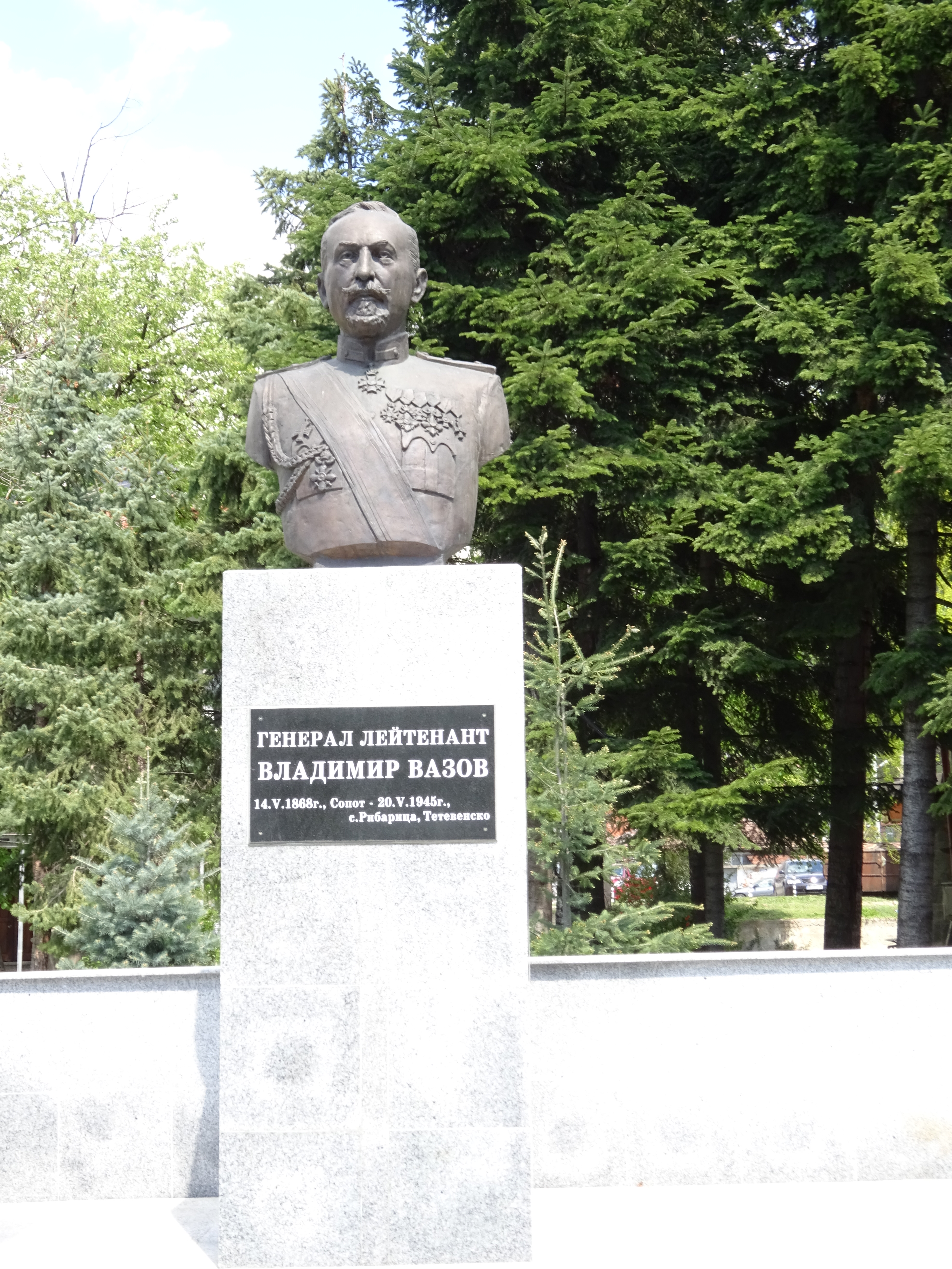 Владимир Вазов, Сопот